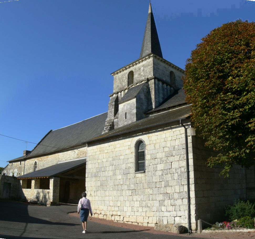 Église Saint-Saturnin de Chouppes